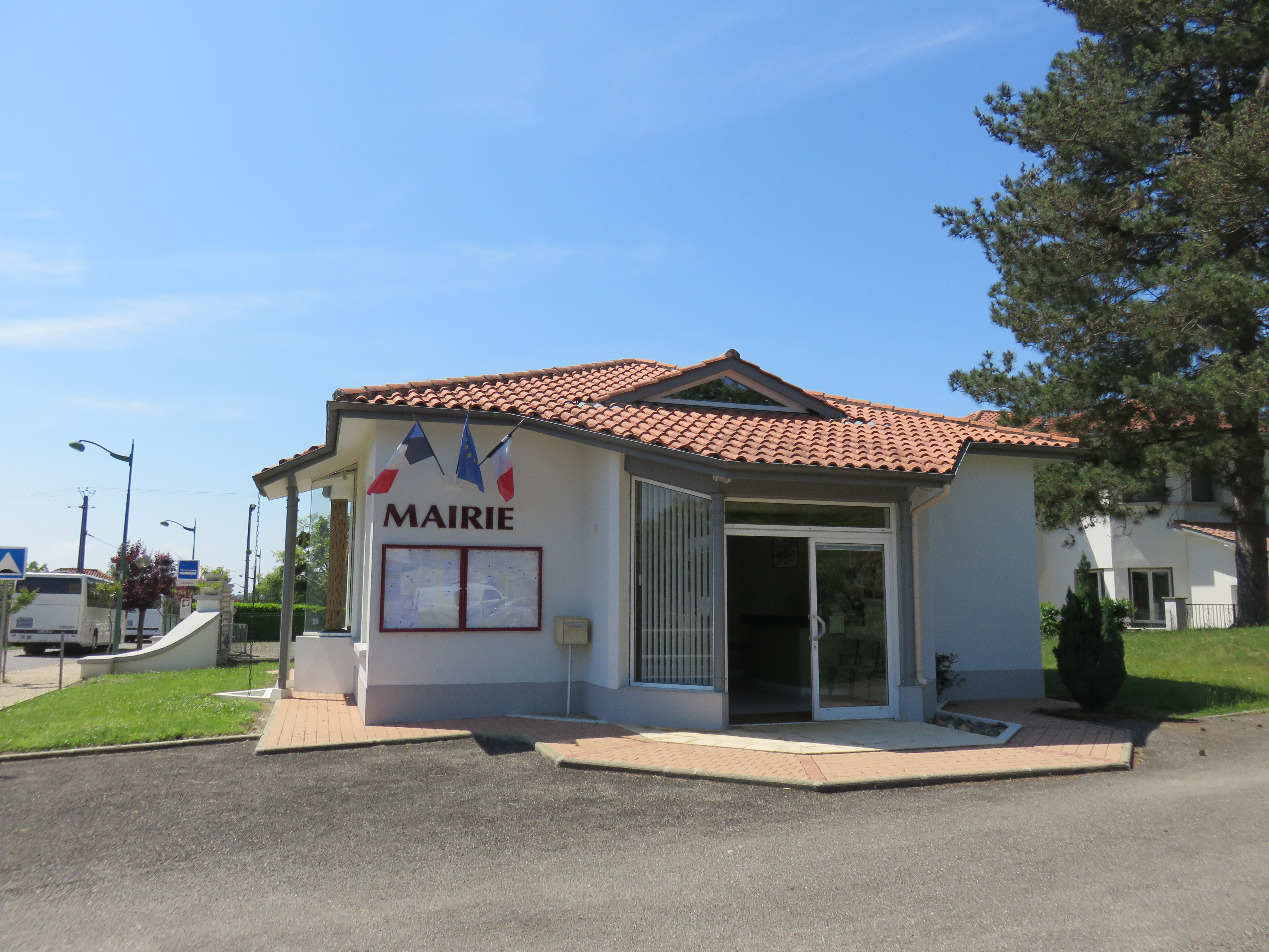 Mairie de Réans (Gers, France).